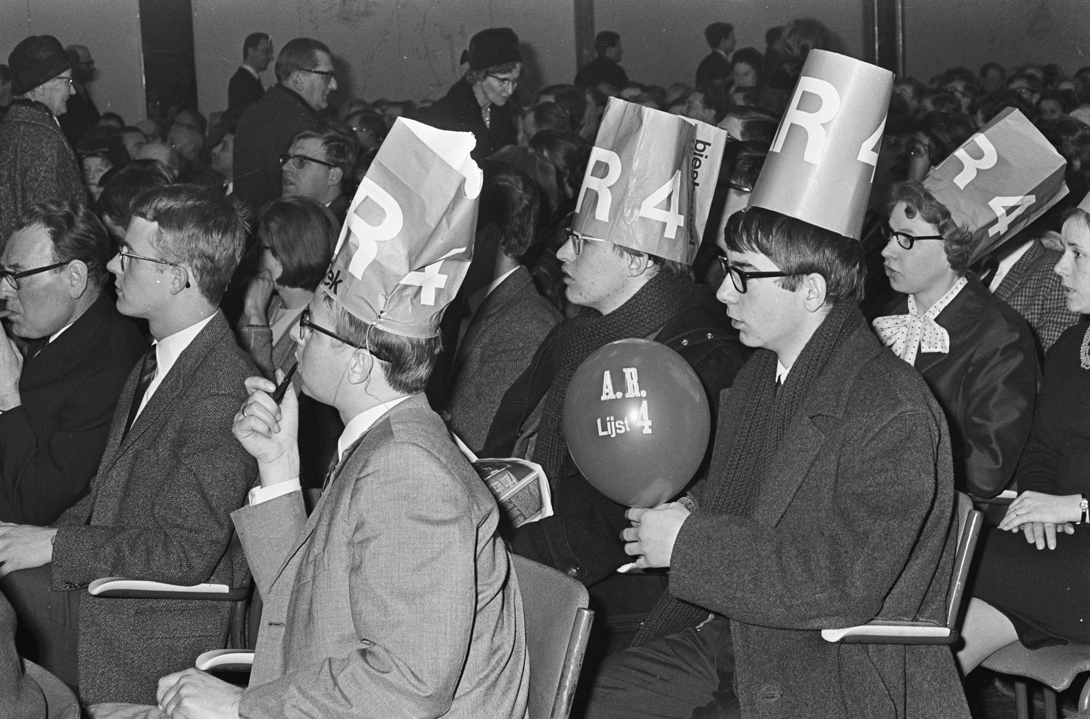 Collectie / Archief : Fotocollectie Anefo Reportage / Serie : [ onbekend ] Beschrijving : Verkiezingsavond AR in Krasnapolsky te Amsterdam, Arjos-jongeren met feesthoeden op Datum : 26 januari 1967 Locatie : Amsterdam, Noord-Holland Instellingsnaam : AR Fotograaf : Merk, Ben / Anefo Auteursrechthebbende : Nationaal Archief Materiaalsoort : Negatief (zwart/wit) Nummer archiefinventaris : bekijk toegang 2.24.01.05 Bestanddeelnummer : 920-0183